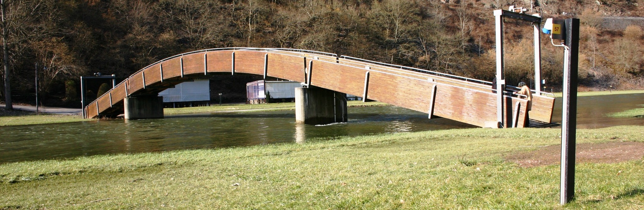 Foussgängerbréck op der Buerschtermillen.